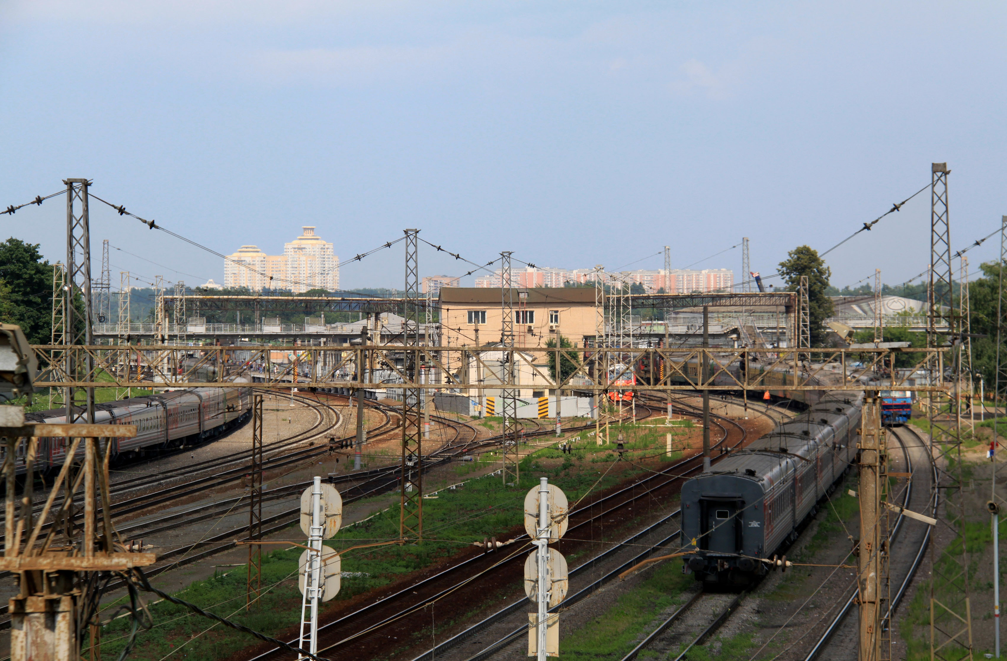 Подъездные пути к станции Царицыно со стороны области